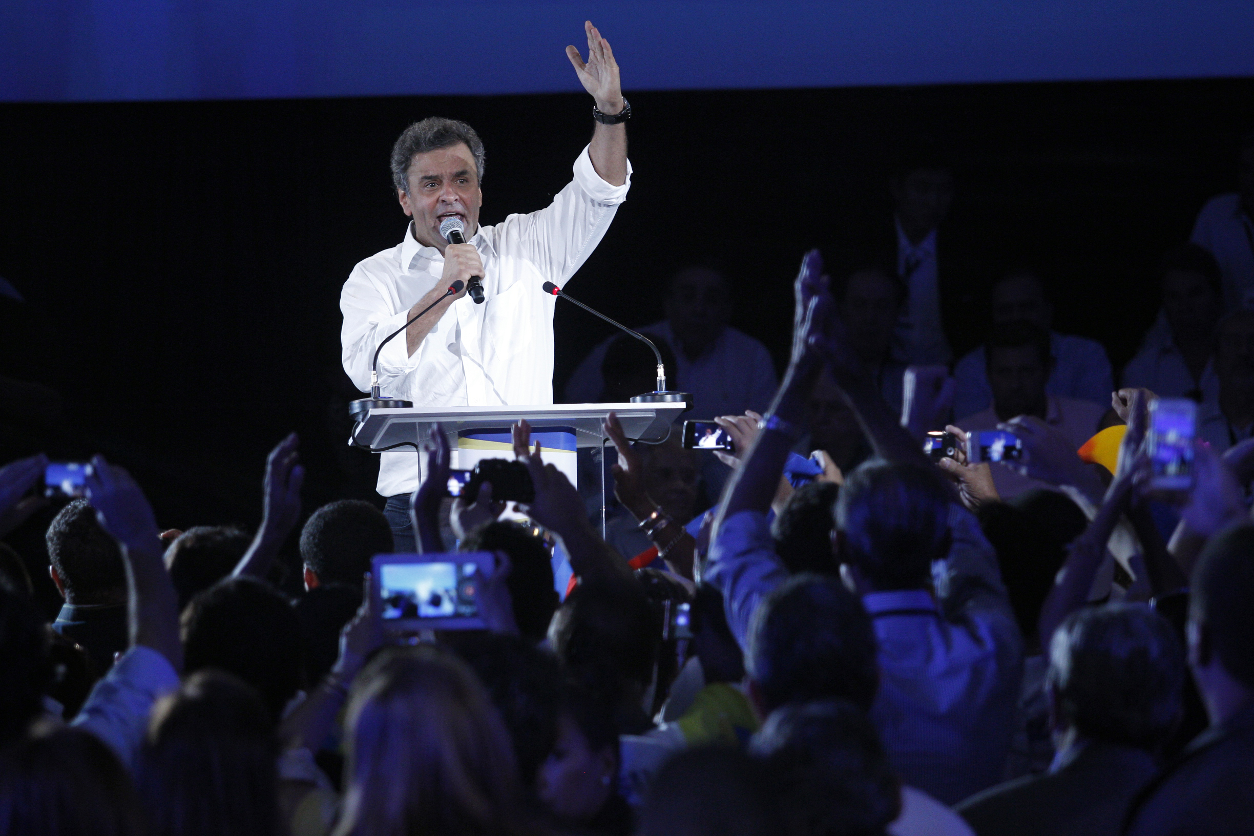 O senador Aécio Neves participou, neste sábado (18/05), da Convenção Nacional do PSDB, em Brasília, que o conduziu à presidência do partido. A convenção contou com a presença do ex-presidente da República, Fernando Henrique, do ex-presidente do PSDB, deputado federal Sérgio Guerra, dos governadores Geraldo Alckmin (SP), Antonio Anastasia (MG), Marconi Perillo (GO), Simão Jatene (PA), Teotônio Vilela (AL), Anchieta Júnior (RR) e Siqueira Campos (TO), do presidente do Instituto Teotônio Vilela, Tasso Jereissati, do ex-governador José Serra. A convenção reuniu 6000 pessoas, entre lideranças, parlamentares e militantes do PSDB. Foto: Divulgação PSDB